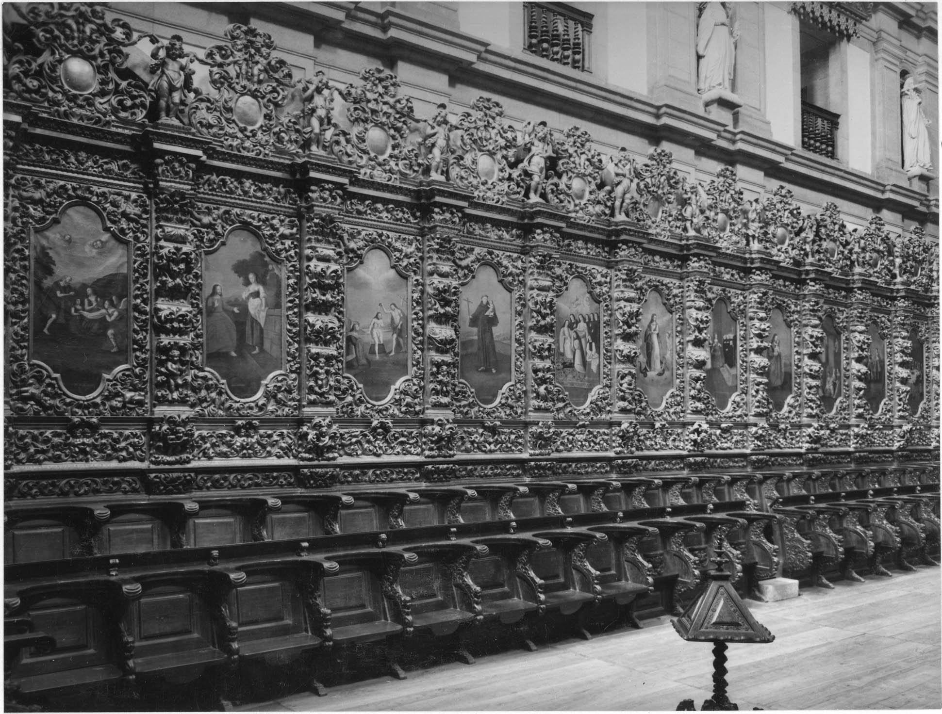 Cadeiral do Coro. Talha dos séculos 17-18. Autor: Robert Chester Smith (1912-1975). Data de produção da fotografia original: 1962-1964. [CFT008.0036.ic]